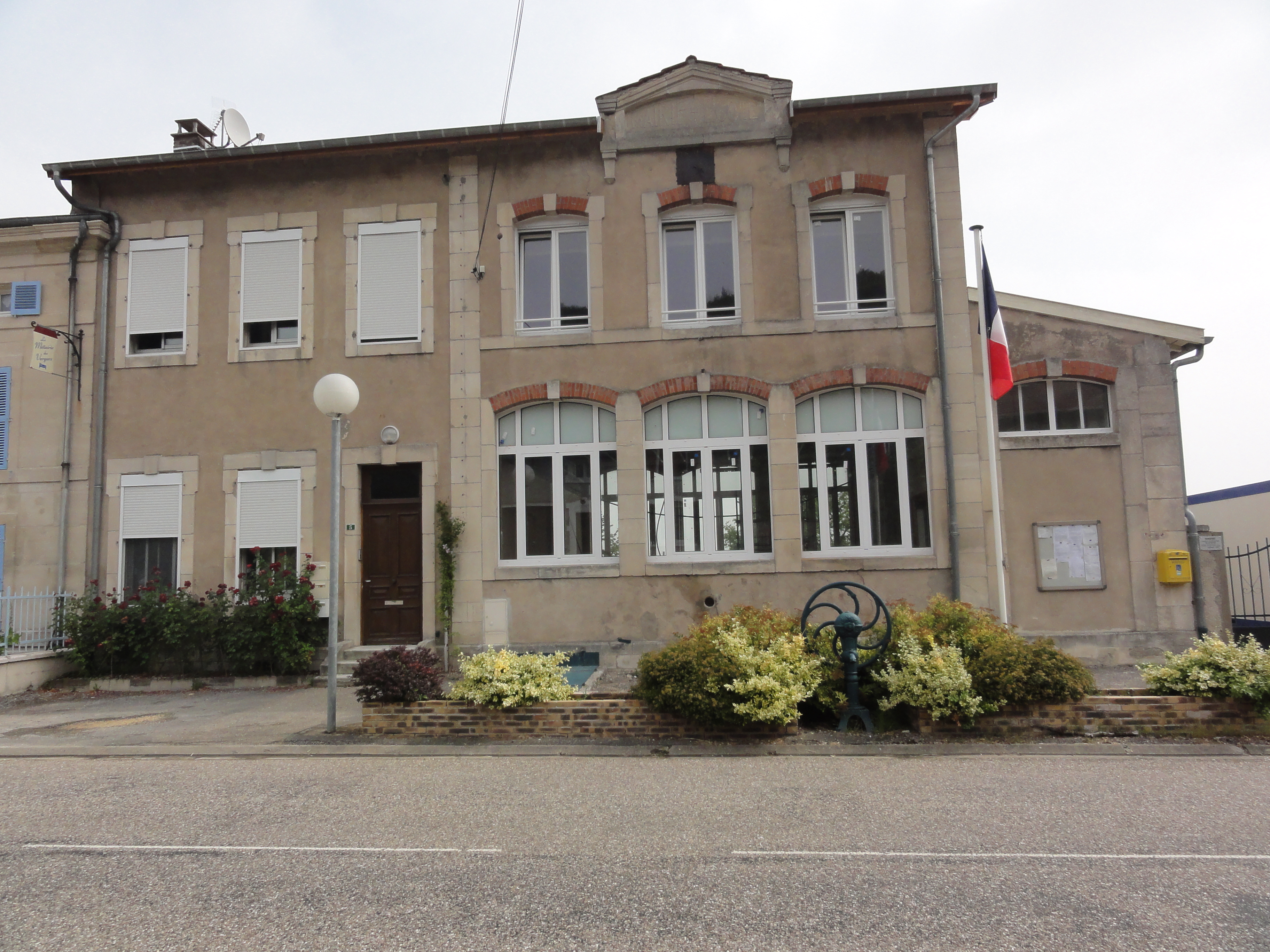 Watronville (Meuse) mairie-école